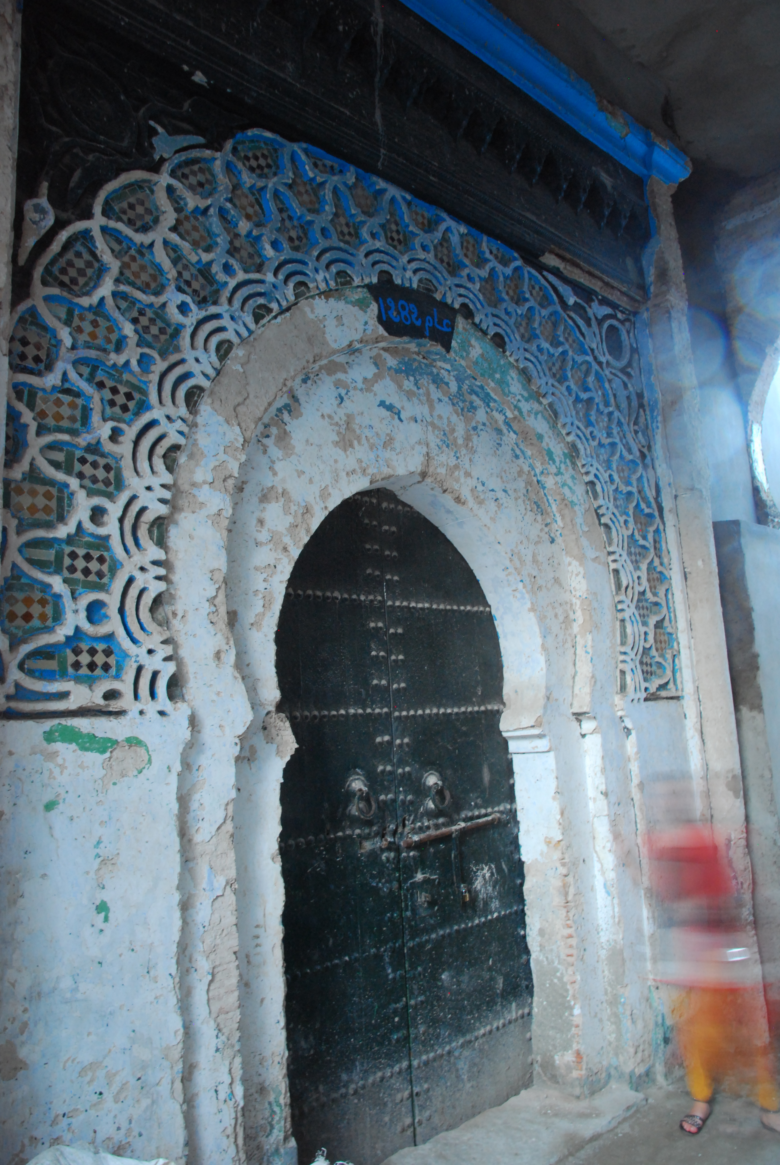 Andalucia-01-0126